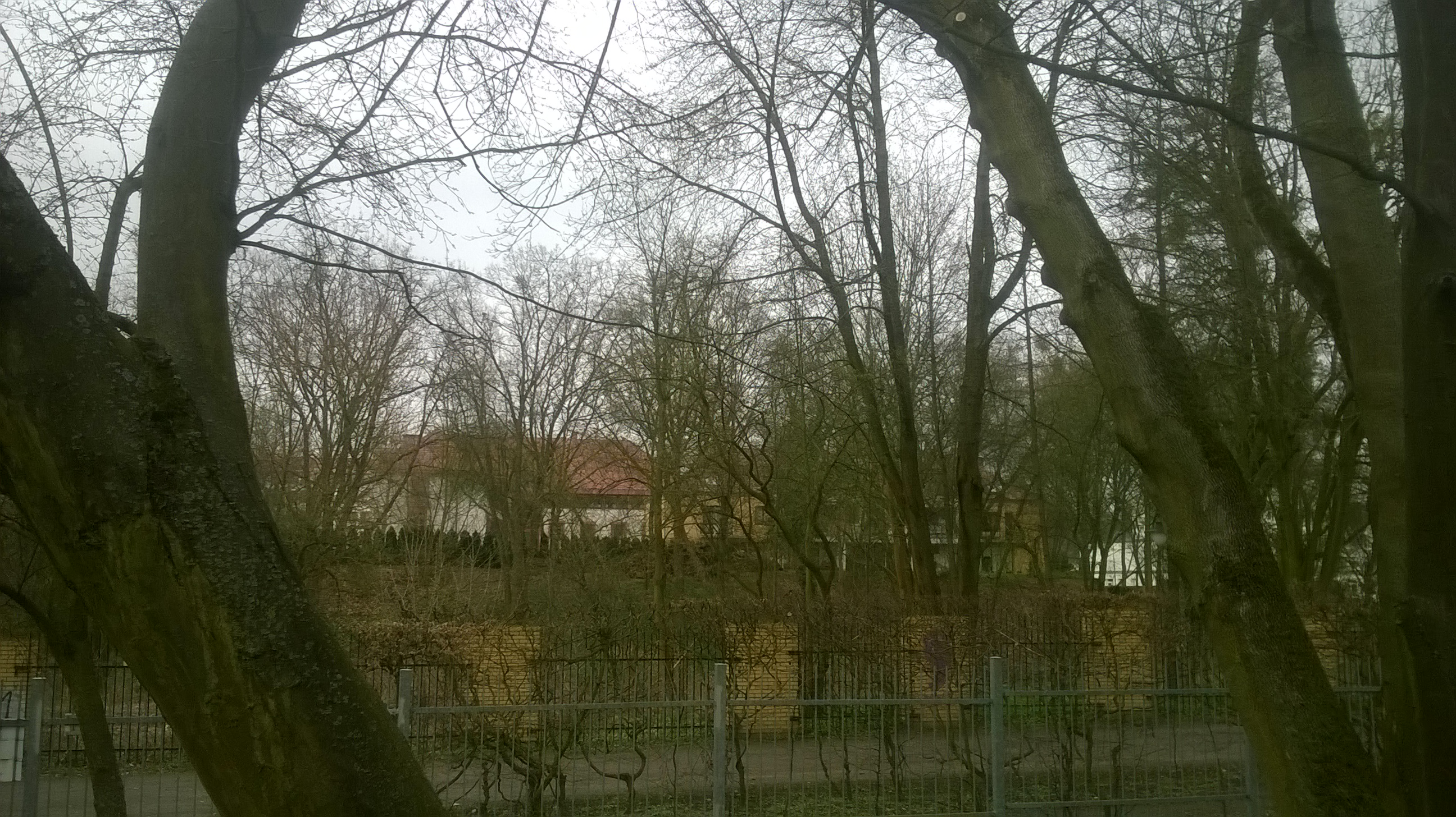 Arcybiskupie Wyższe Seminarium Duchowne w Szczecinie